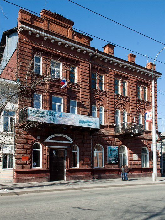 Здание гостиницы 'россия' (Томская область, Томск, фрунзе улица, 6)